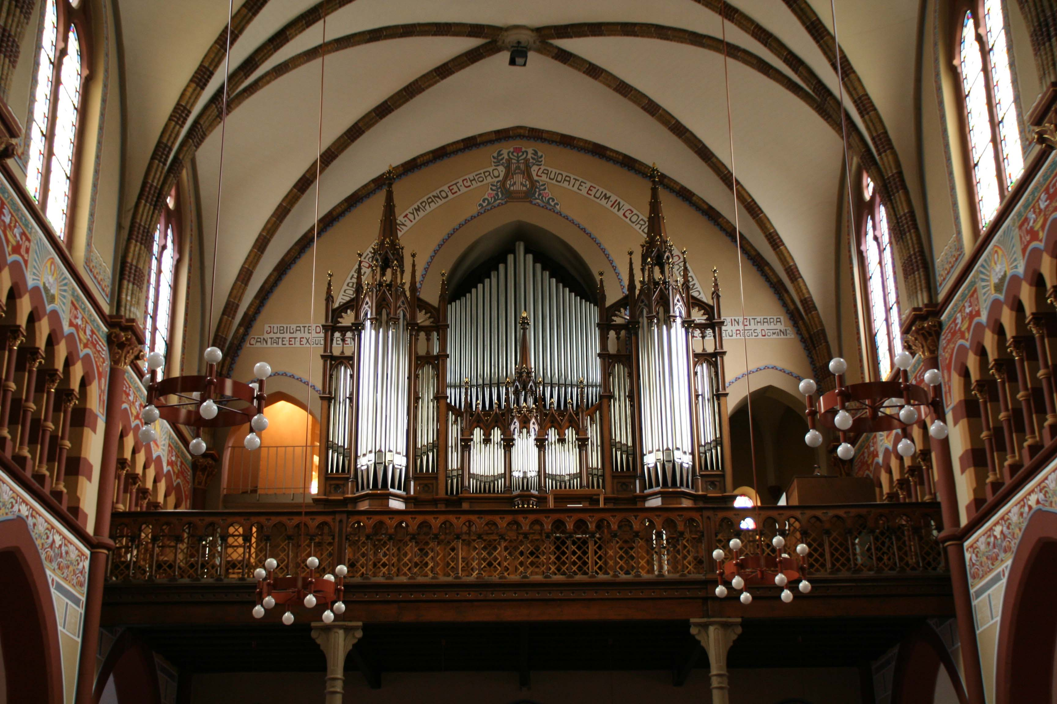 Uergel vun der Rëmelenger Poarkierch.